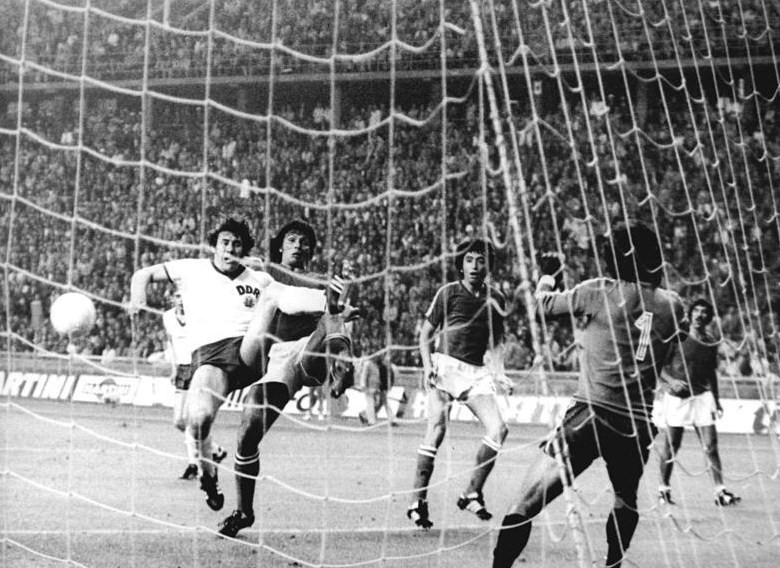 ADN-ZB-Mittelstädt-18.6.74-Westberlin: X. Fußball-Weltmeisterschaft-1. Finalrunde, Gruppe 1: DDR - Chile 1:1- DDR- Stürmer Eberhard Vogel (links) versucht einen Flankenball zu erreichen. Im Vordergrund rechts Torwart Leopoldo Vallejos (Chile).